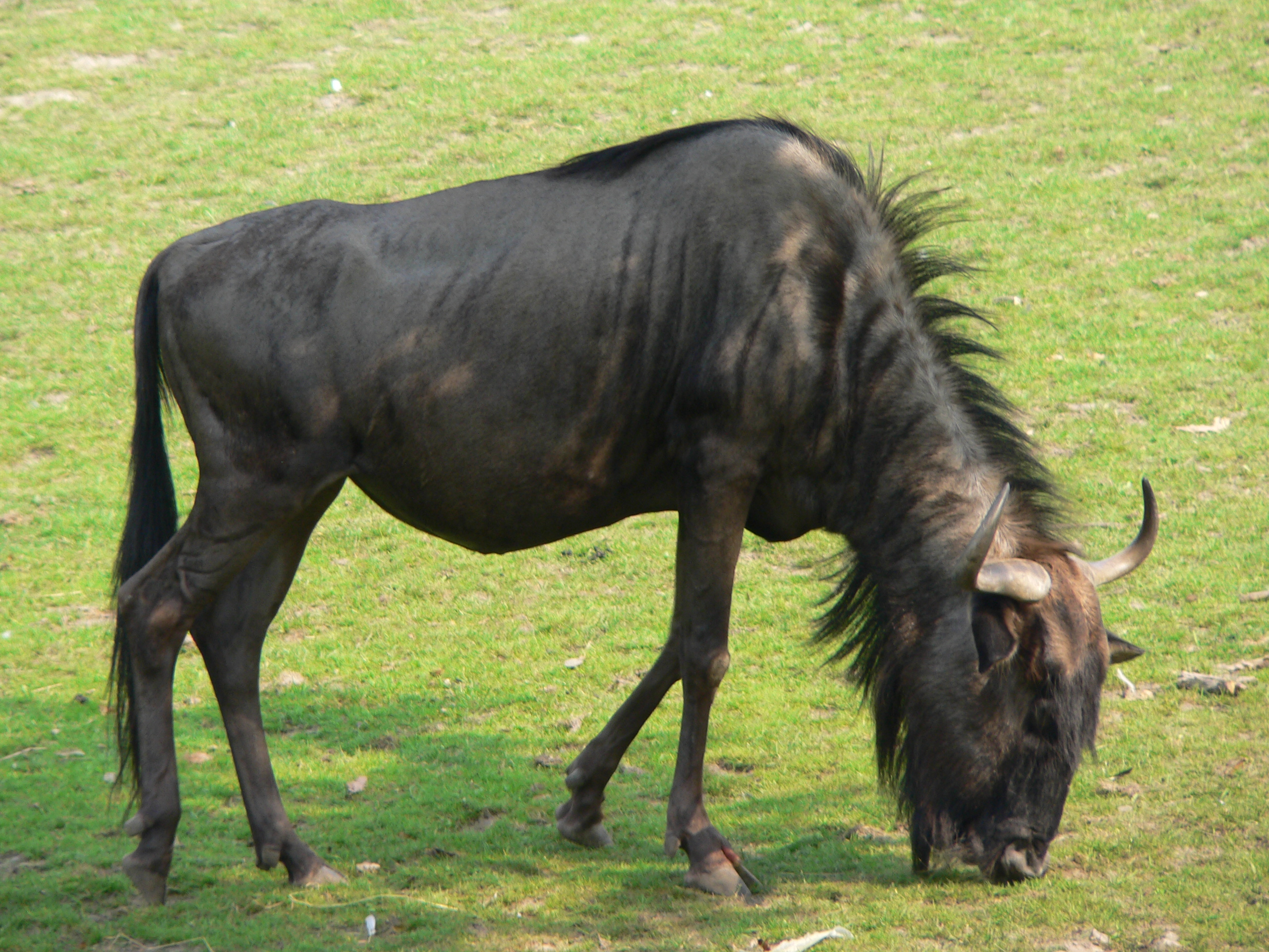 Gnu öküzü